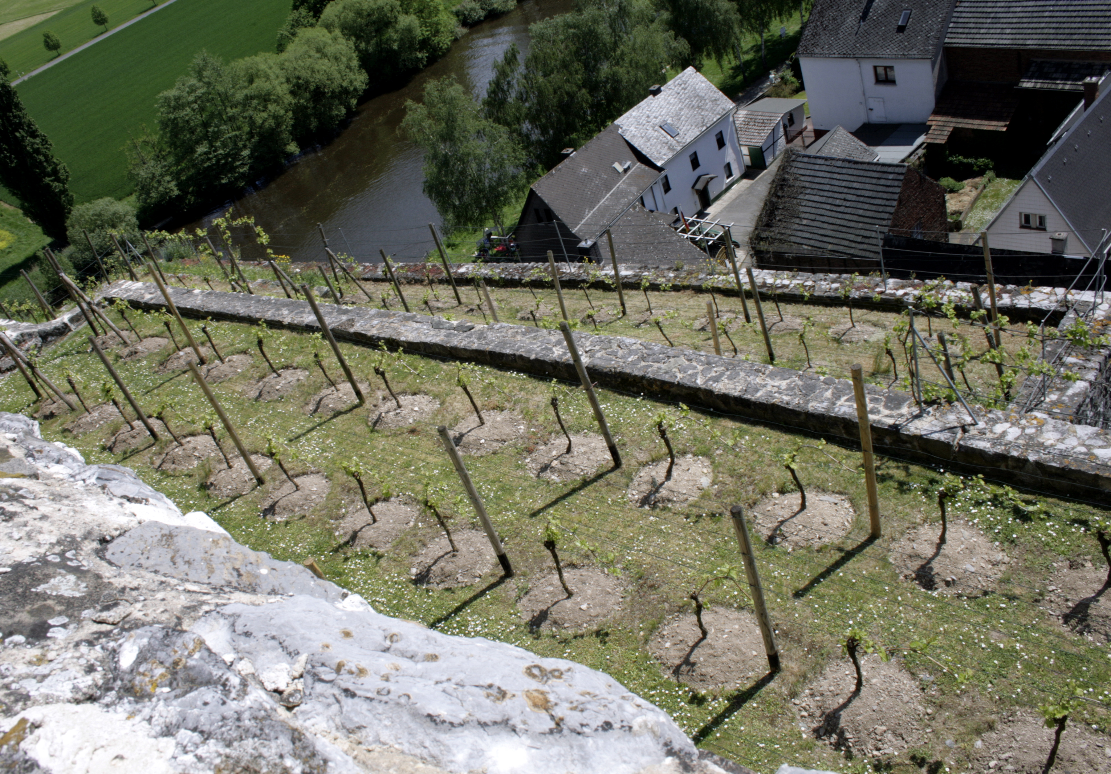 Weingarten auf dem Kirchenfelsen von Dietkirchen, Deutschland